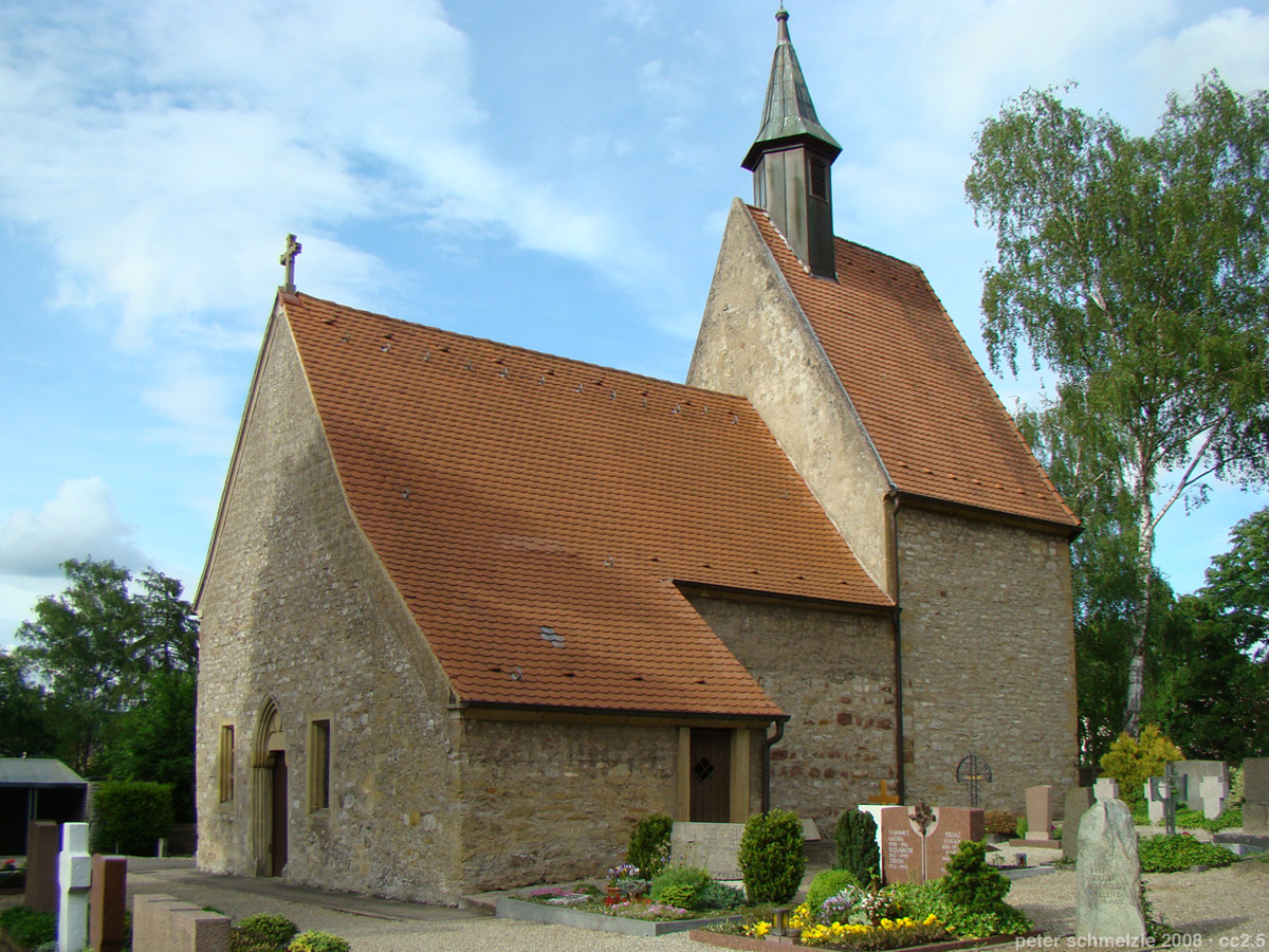 Friedhofskapelle in Gundelsheim (Württemberg)